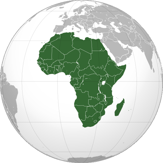 Mapa Afryki po oddzieleniu się Sudanu Południowego od Sudanu 9 lipca 2011.